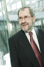 Hans Kaufmann